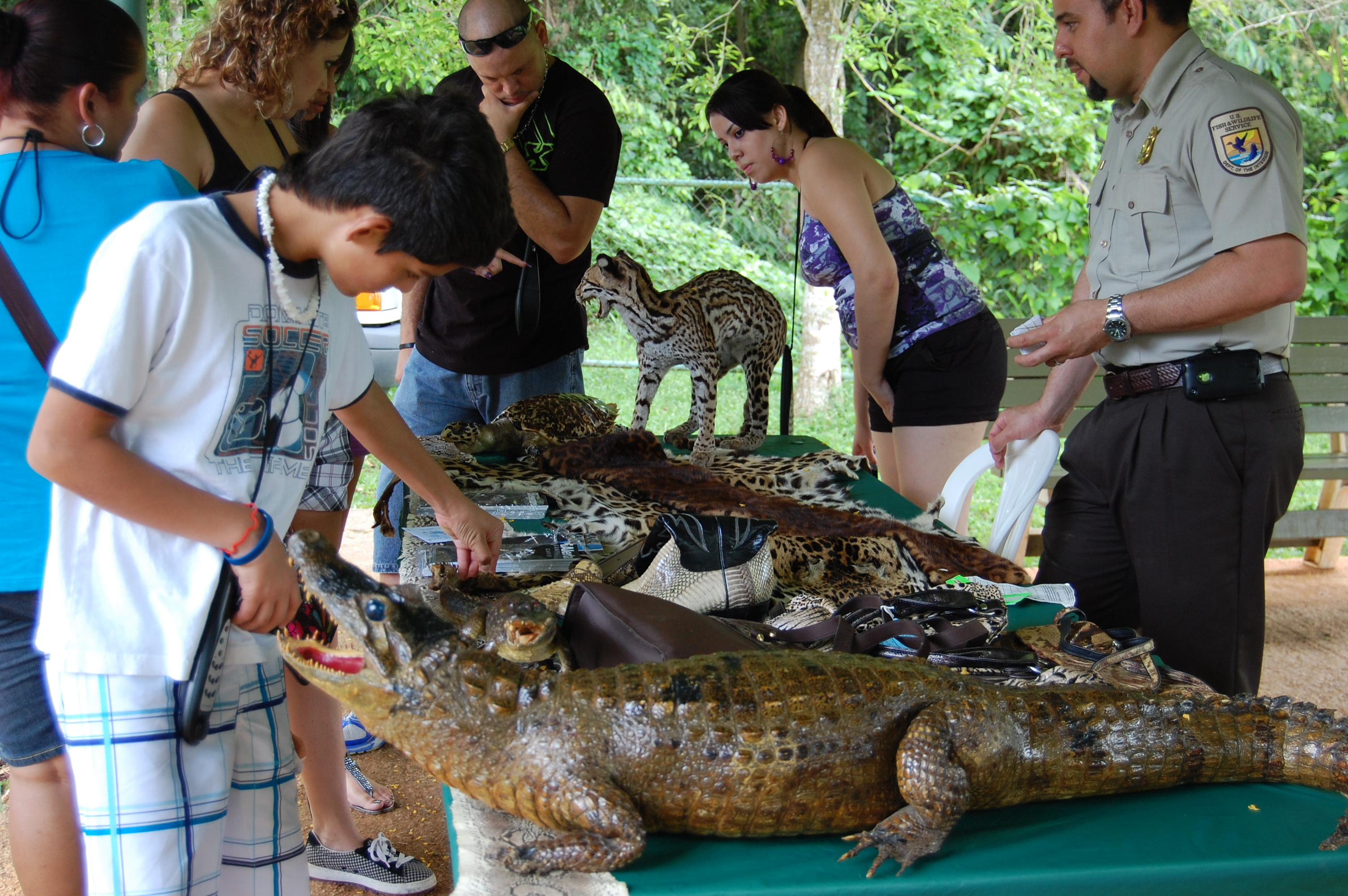 May 21, 2011, Mayaguez, Puerto Rico, By: Lilibeth Serrano, USFWS